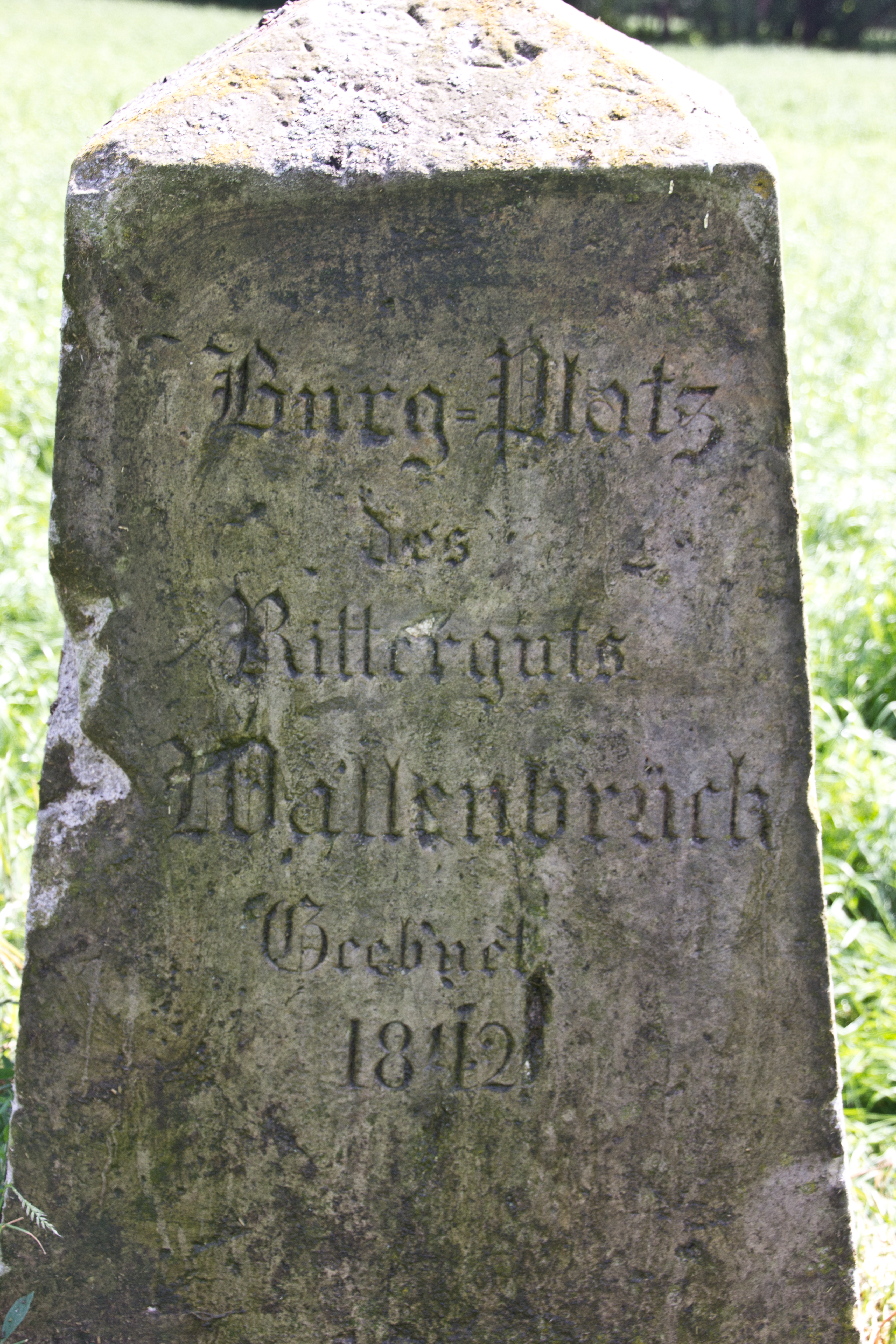 Beschriftung des Obelisken zum Gut Warmenau zeigend